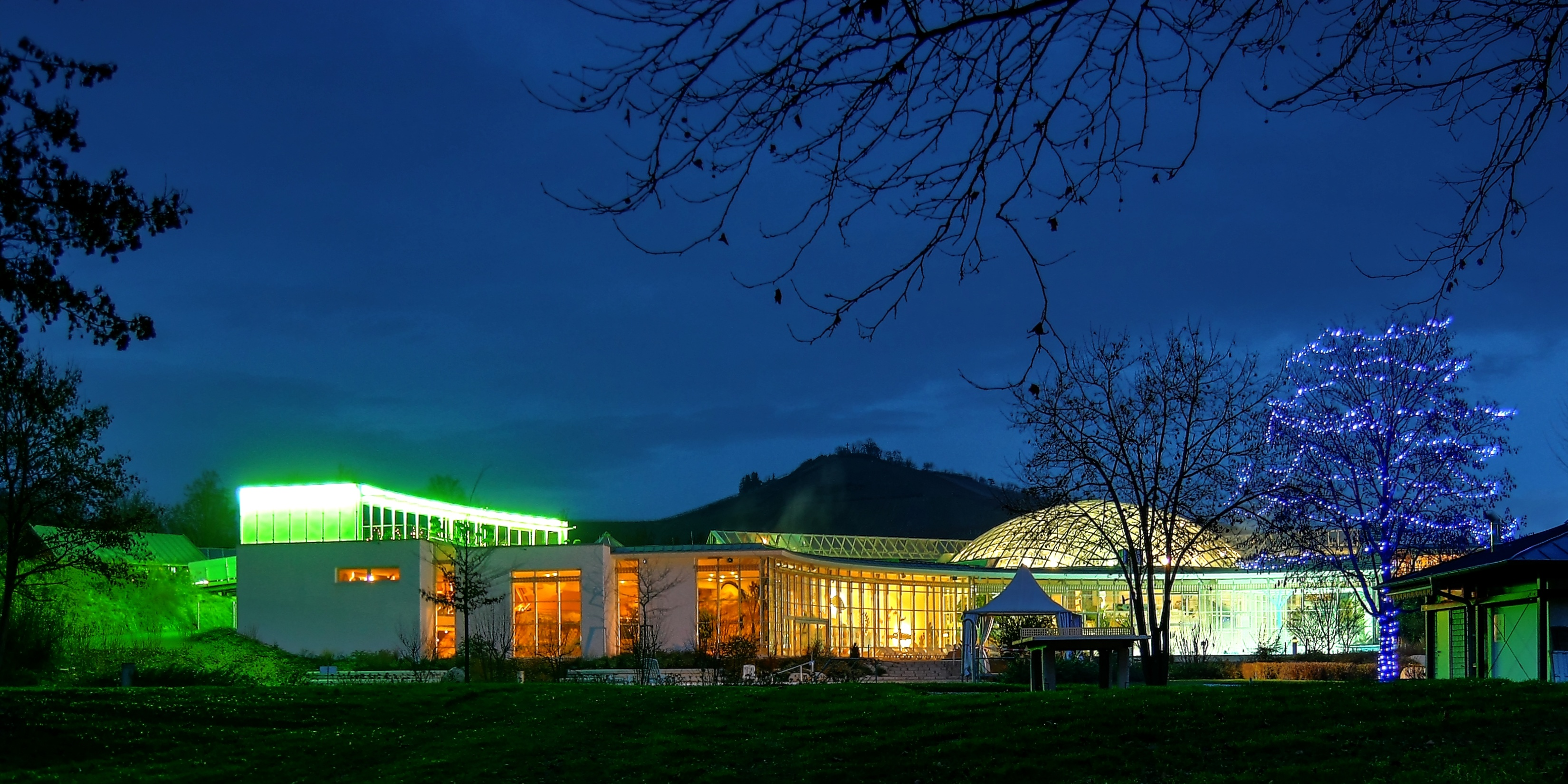 Spaß- und Freizeitbad AQUAtoll (2009), Neckarsulm/Deutschland